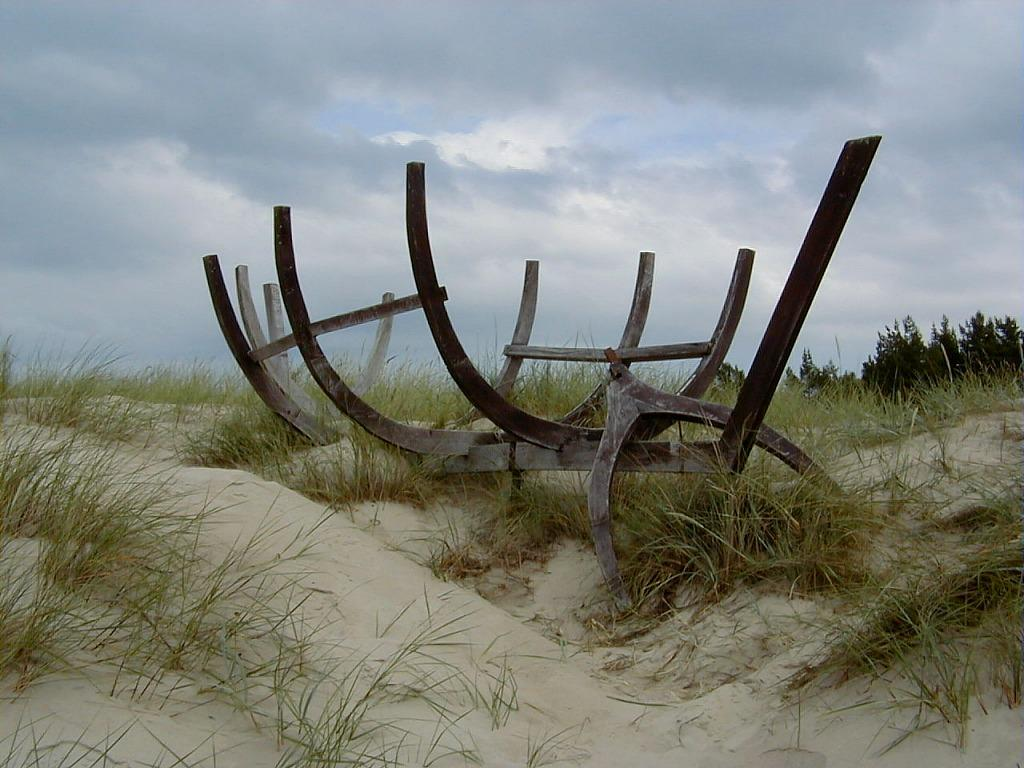 Mazirbe, laivas skelets - piemineklis lībiešiem 2000-06-24